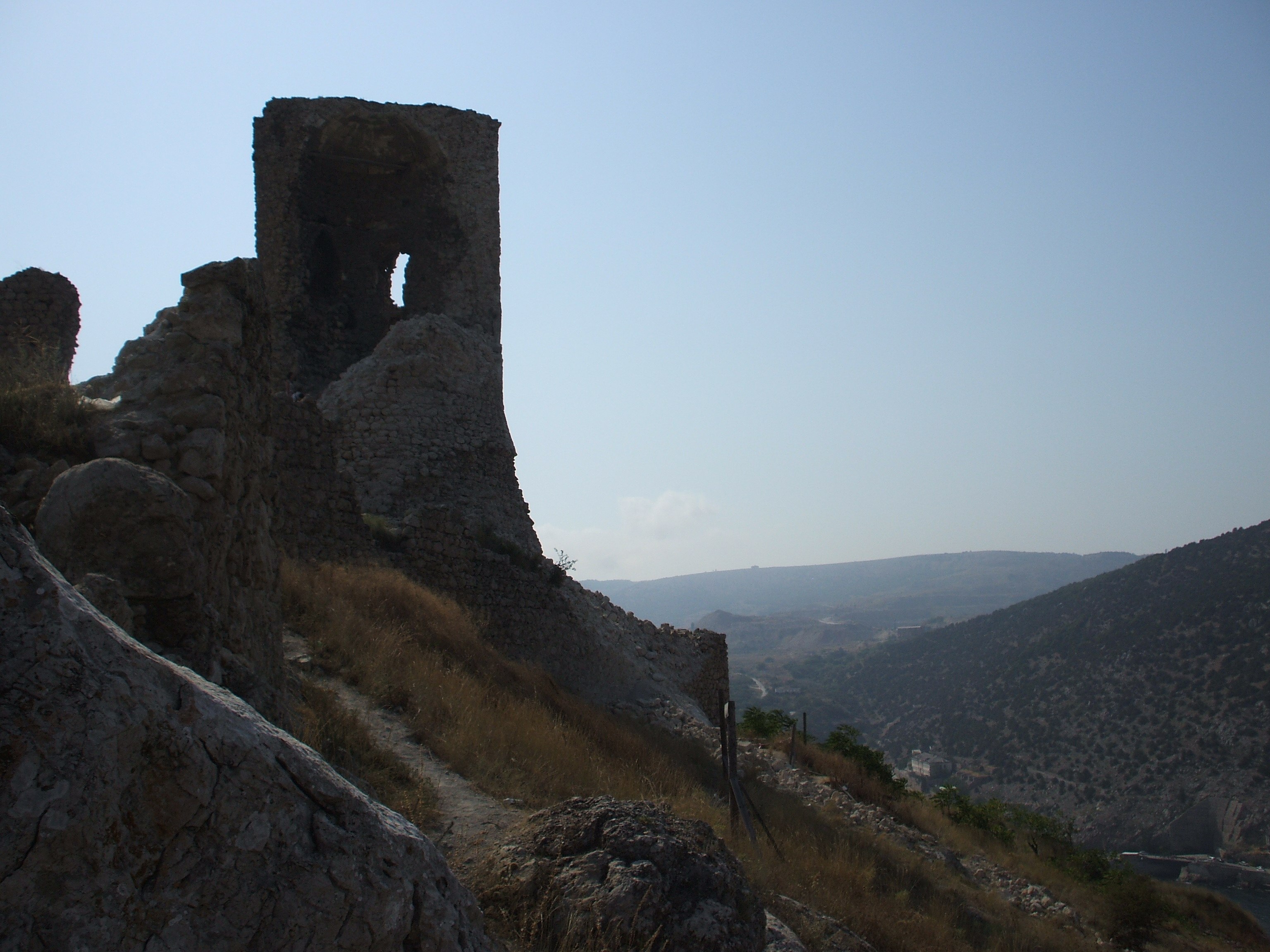 вид крепости Чемболо